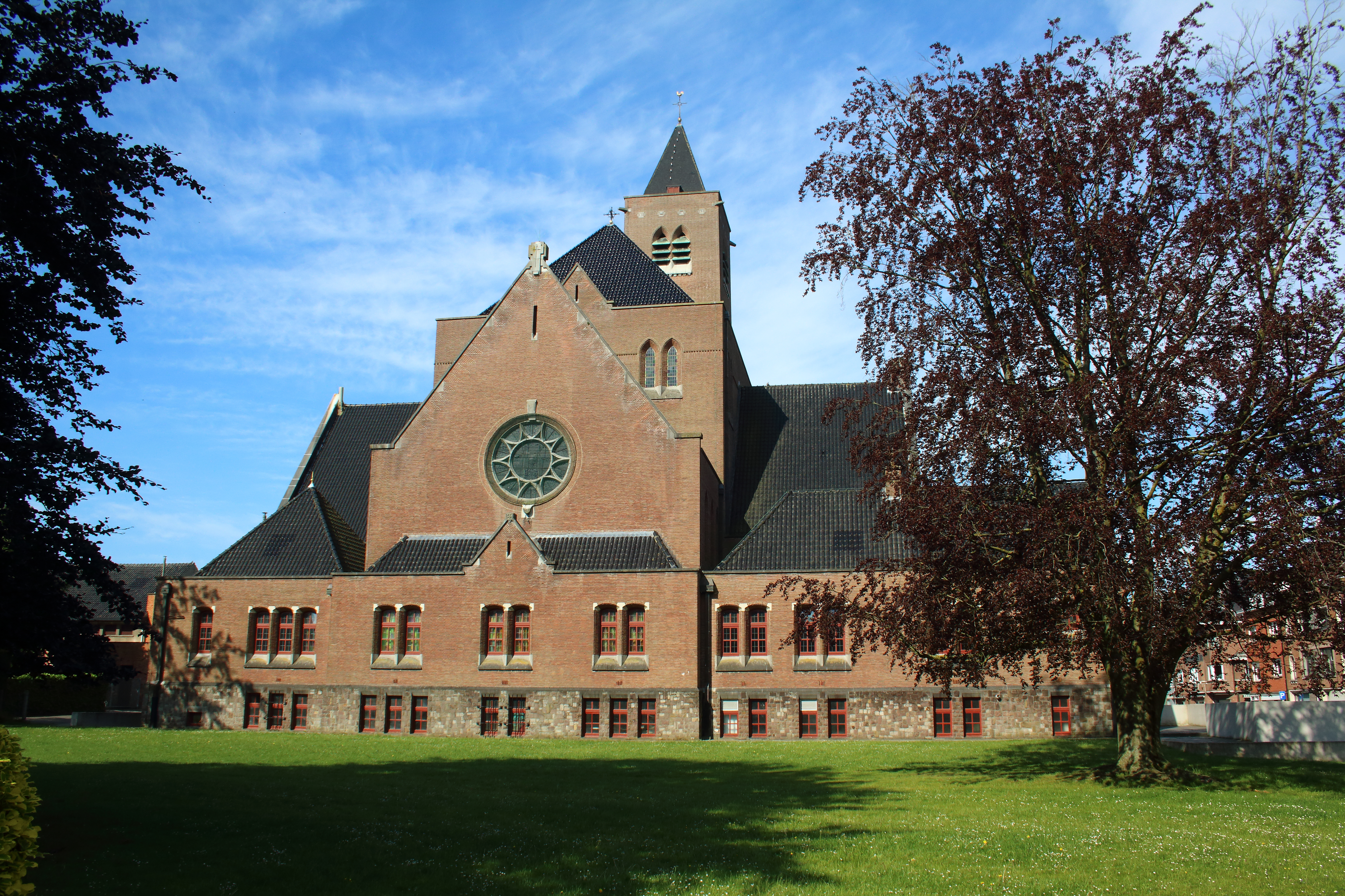 Heilig Hartkerk, Bevegem, Zottegem, Vlaanderen, België